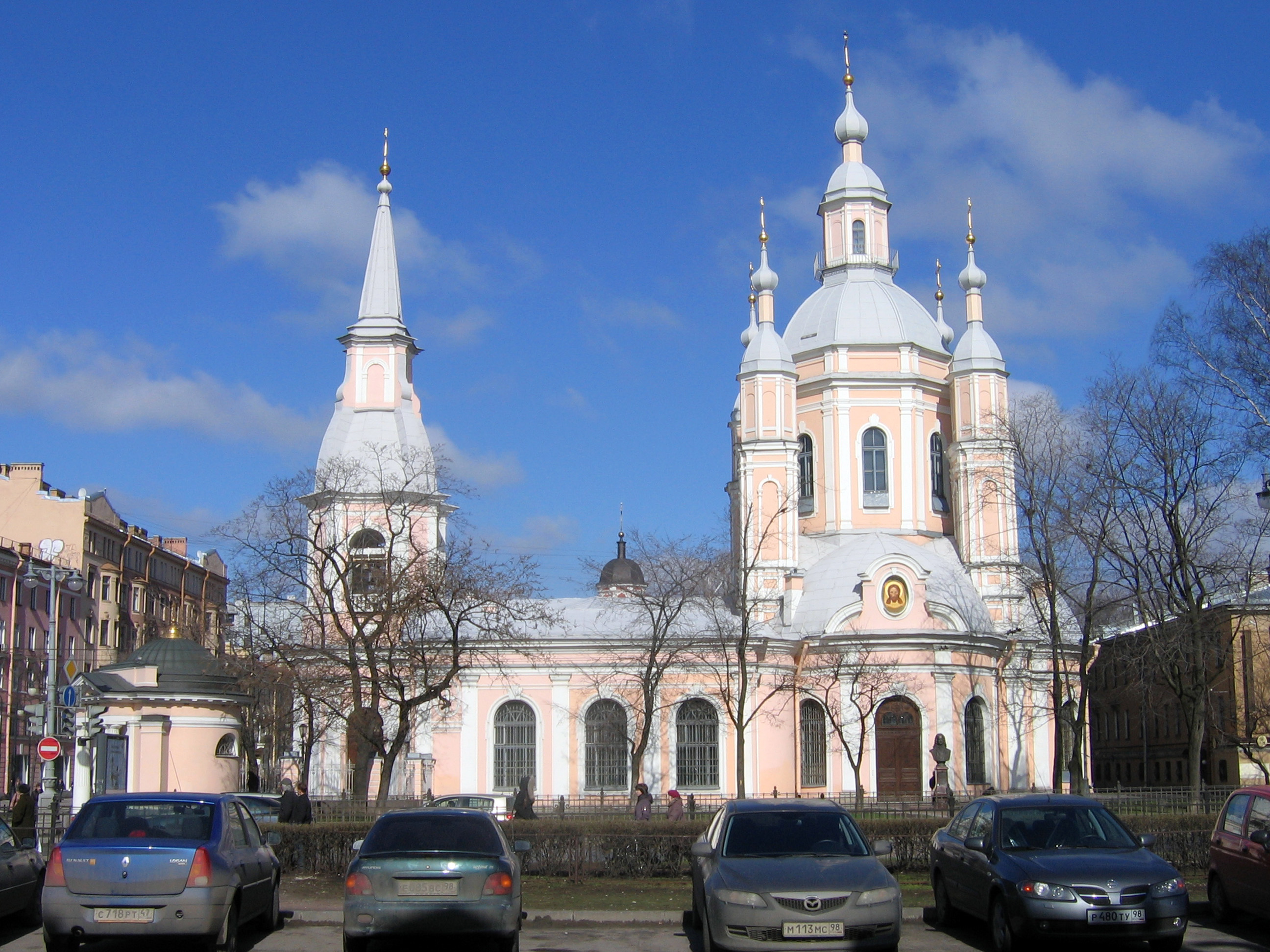 Собор святого апостола Андрея Первозванного: 6-я линия Васильевского острова, 11, Василеостровский район, Санкт-Петербург